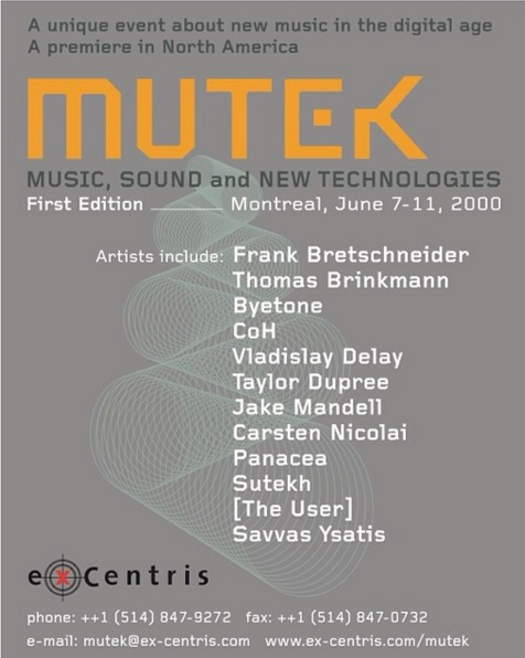 lineup, dates, parenaires